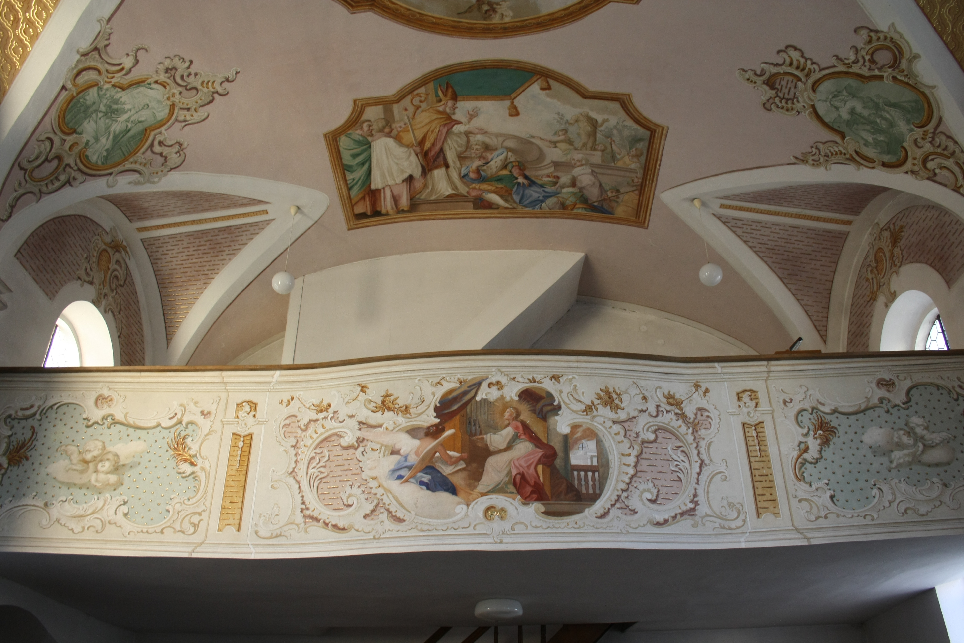 Katholische Filialkirche St. Nikolaus in Wolpertstetten (Blindheim), Empore mit Darstellung der hl. Cäcilia an der Emporenbrüstung, Deckengemälde mit Darstellung des hl. Nikolaus, der einen Fürsten tauft und das Standbild eines Götzen zerstören lässt